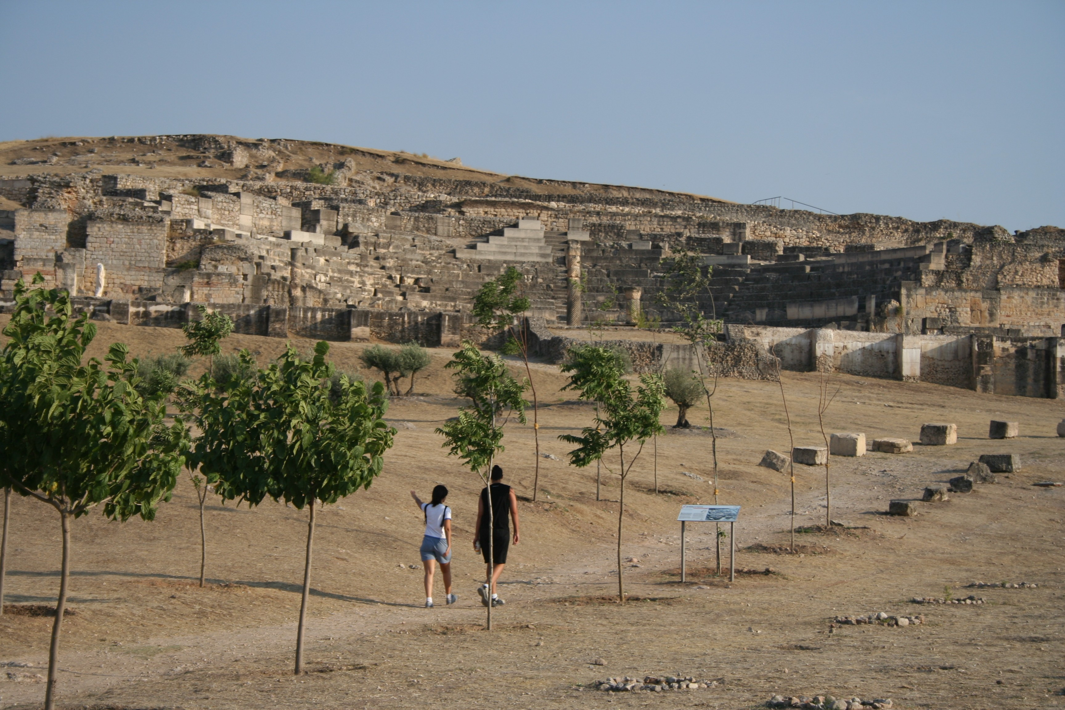 Teatro romano de Segóbriga, provincia de Cuenca, Castilla-La Mancha.